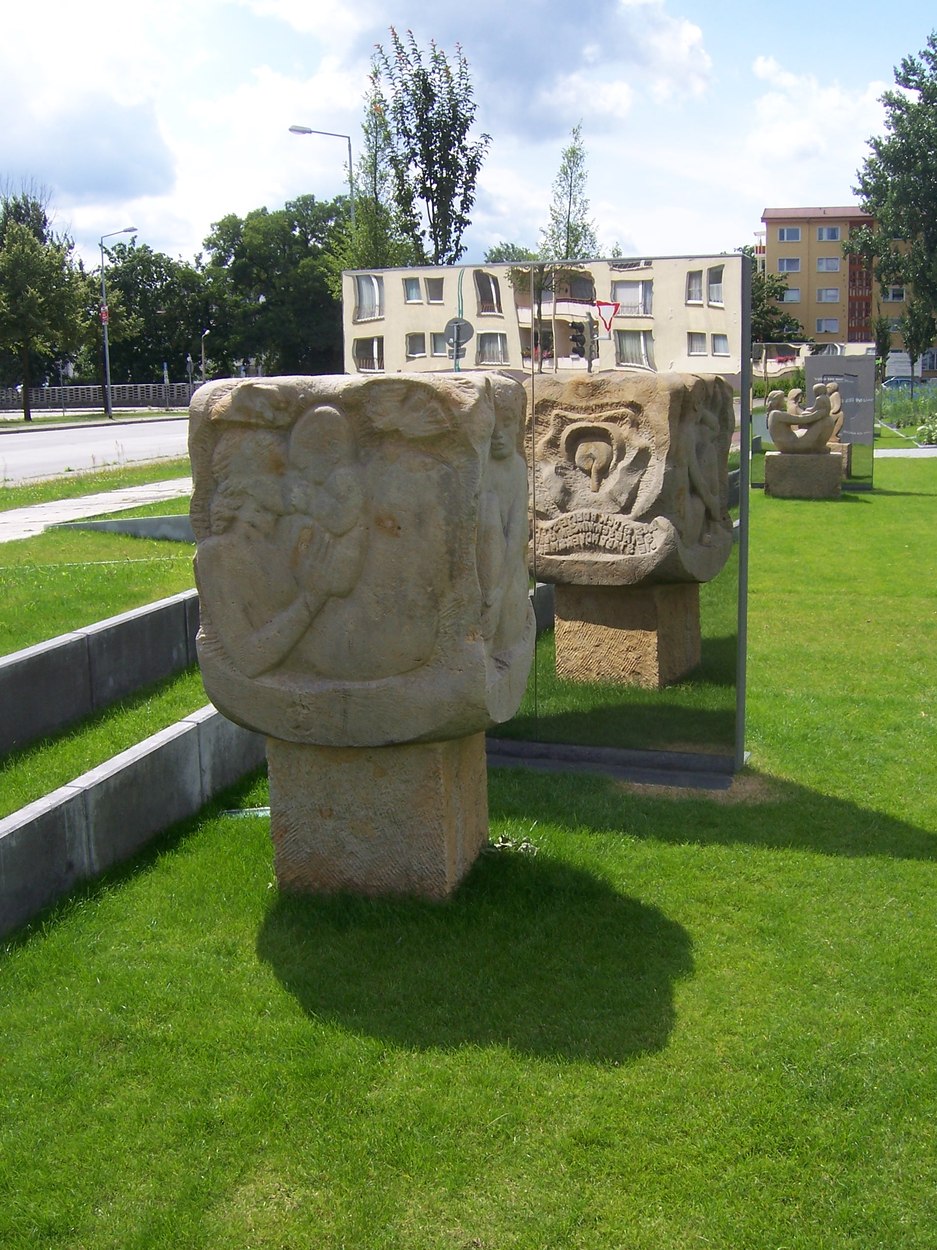 Skulptur Baum des Glücks in Hoyerswerda, von Juri Orechow (Sowjetunion)